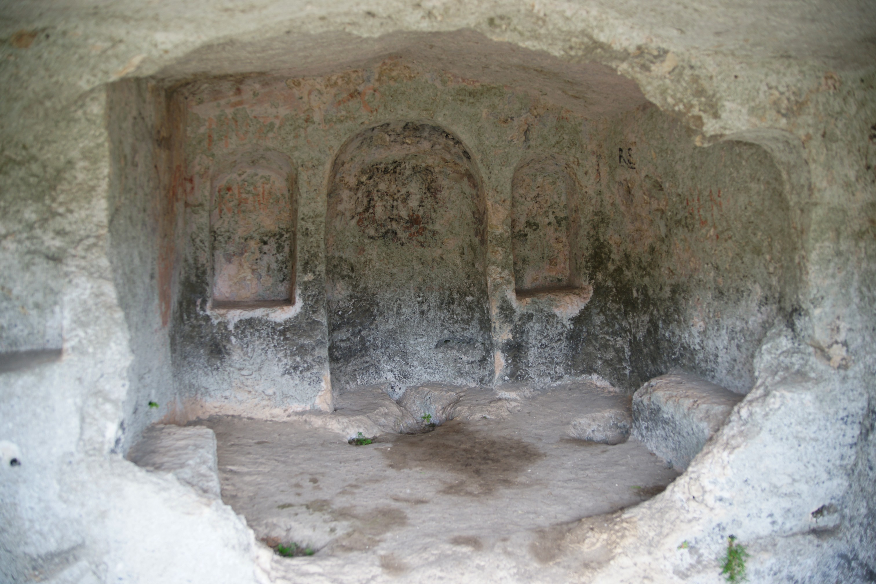 Pantalica: Chiesa San Miciadoro (byzant.)